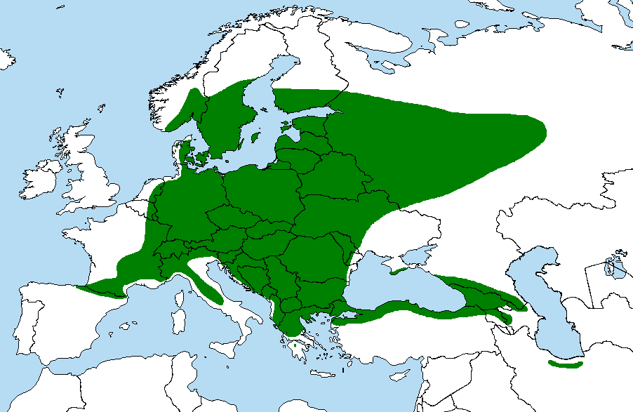 Acer platanoides map